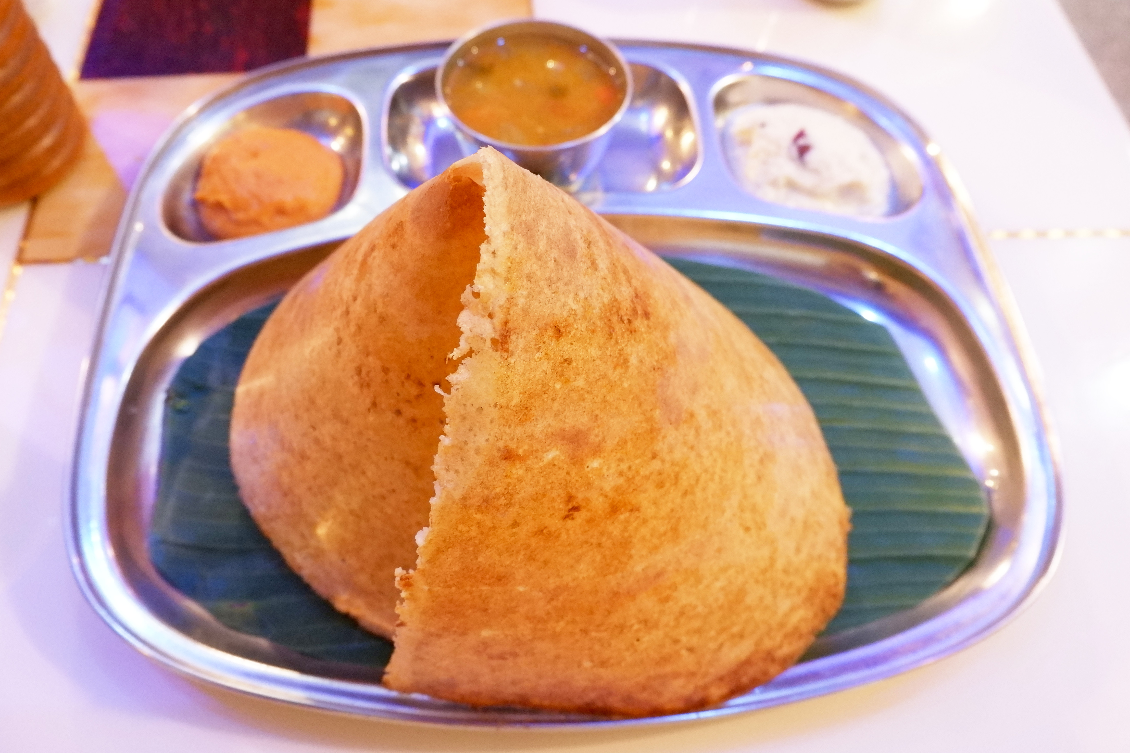 Dosa at Sri Ganesha Restauran, Bangkok